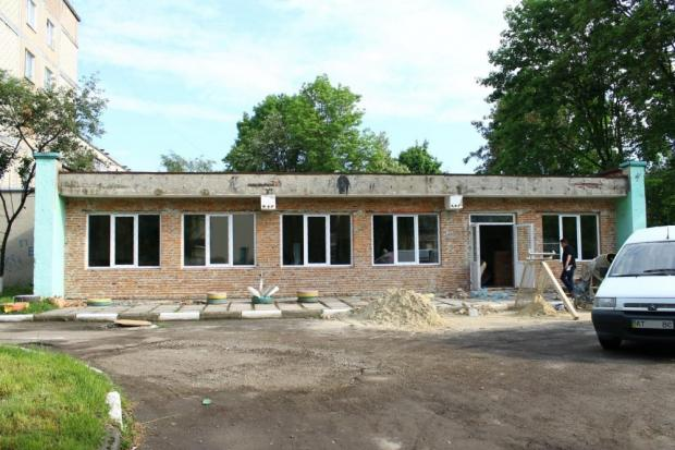 Кімната школяра